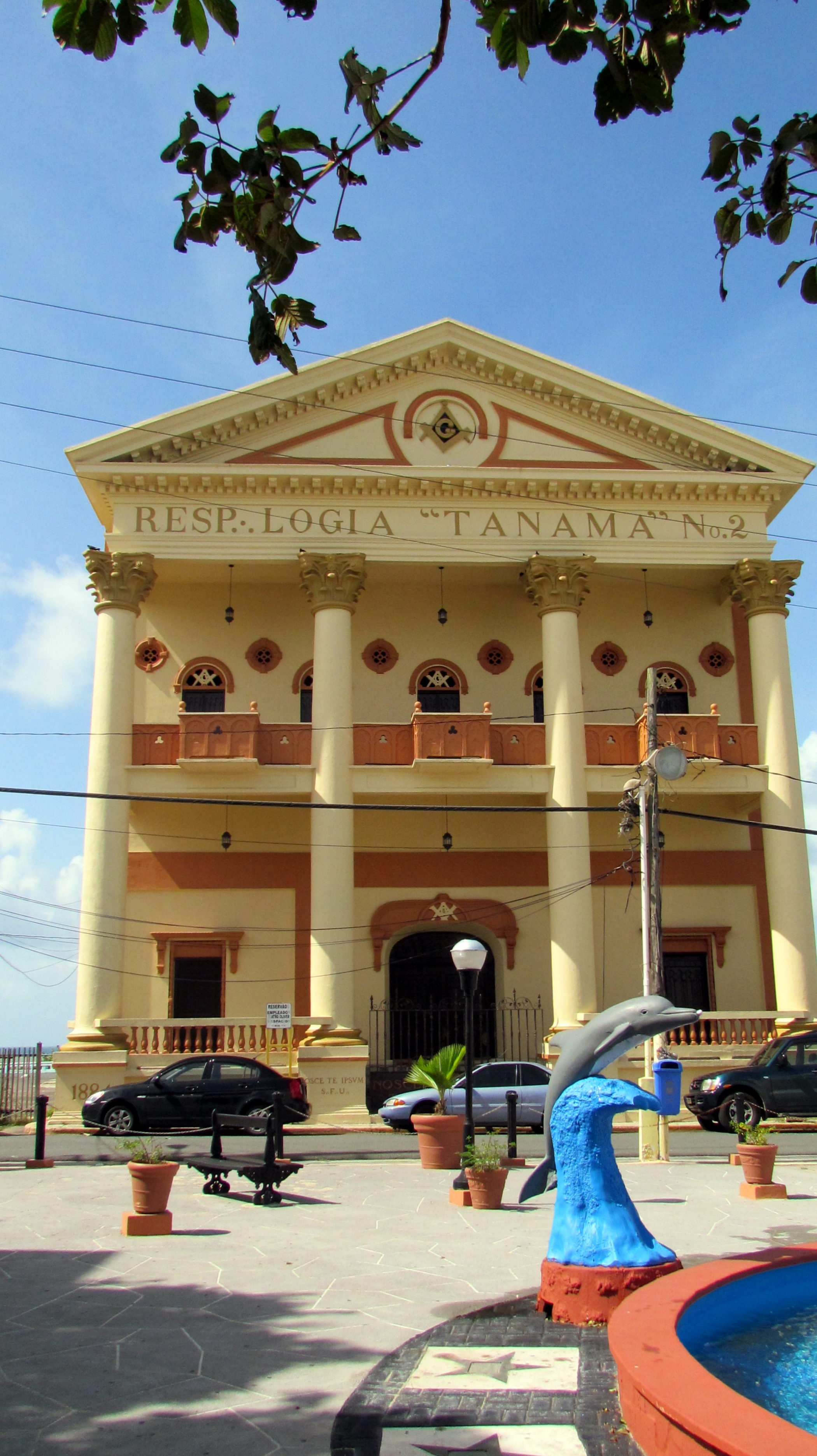 "Respetable Logia Tanama", Arecibo, Puerto Rico